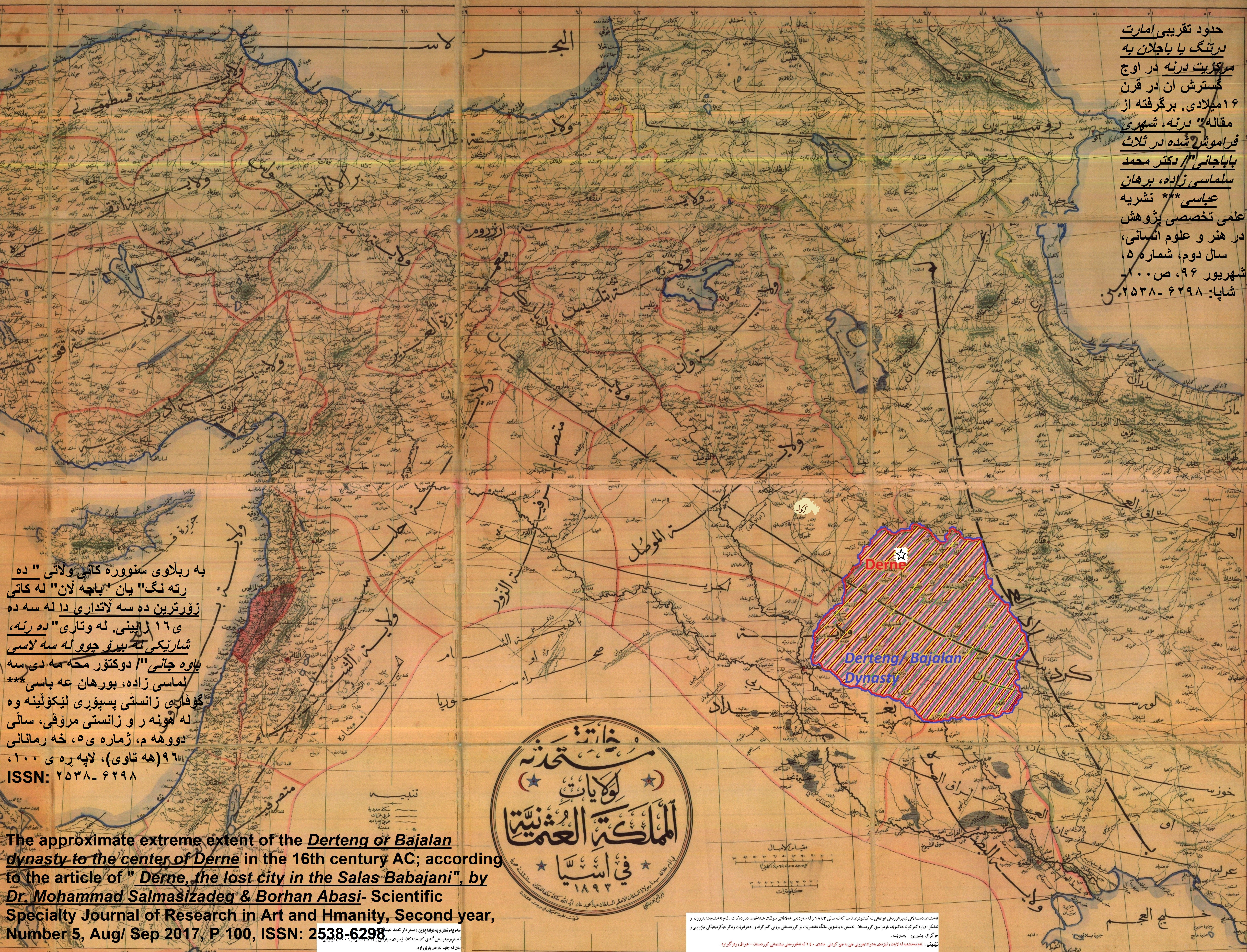 The approximate extreme extent of the Derteng or Bajalan dynasty to the center of Derne in the 16th century AC; according to the article of ” Derne, the lost city in the Salas Babajani”, by Dr. Mohammad Salmasizadeg & Borhan Abasi- Scientific Specialty Journal of Research in Art and Hmanity, Second year, Number 5, Aug/ Sep 2017, P 100, ISSN: 2538-6298